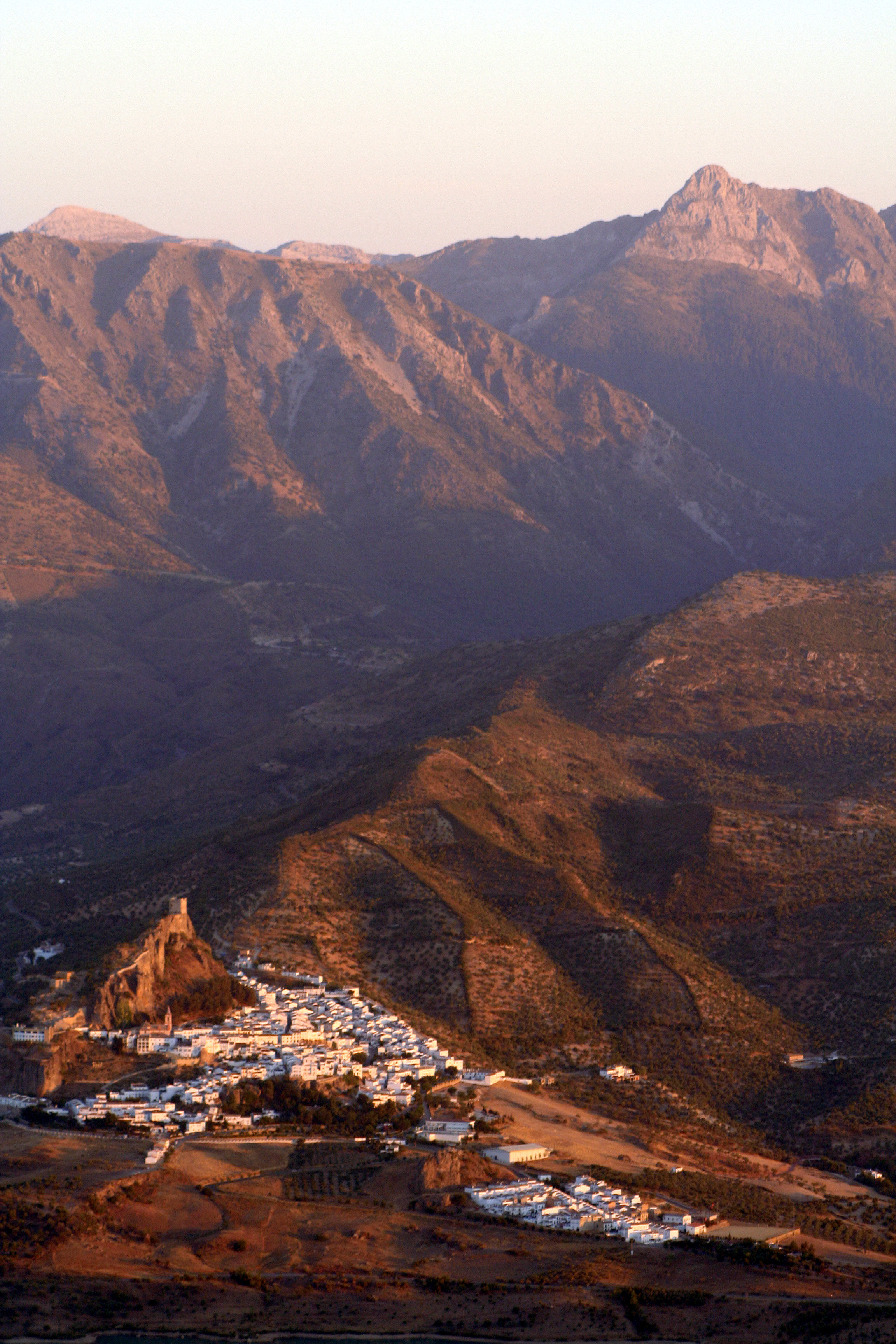 Zahara desde la Sierra de Lijar